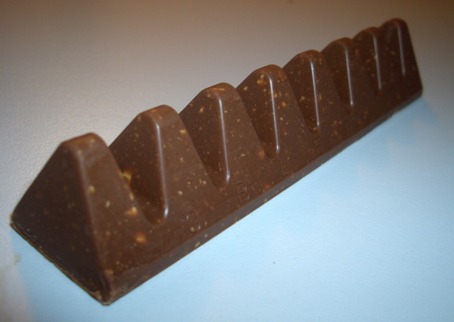 pascal binczak